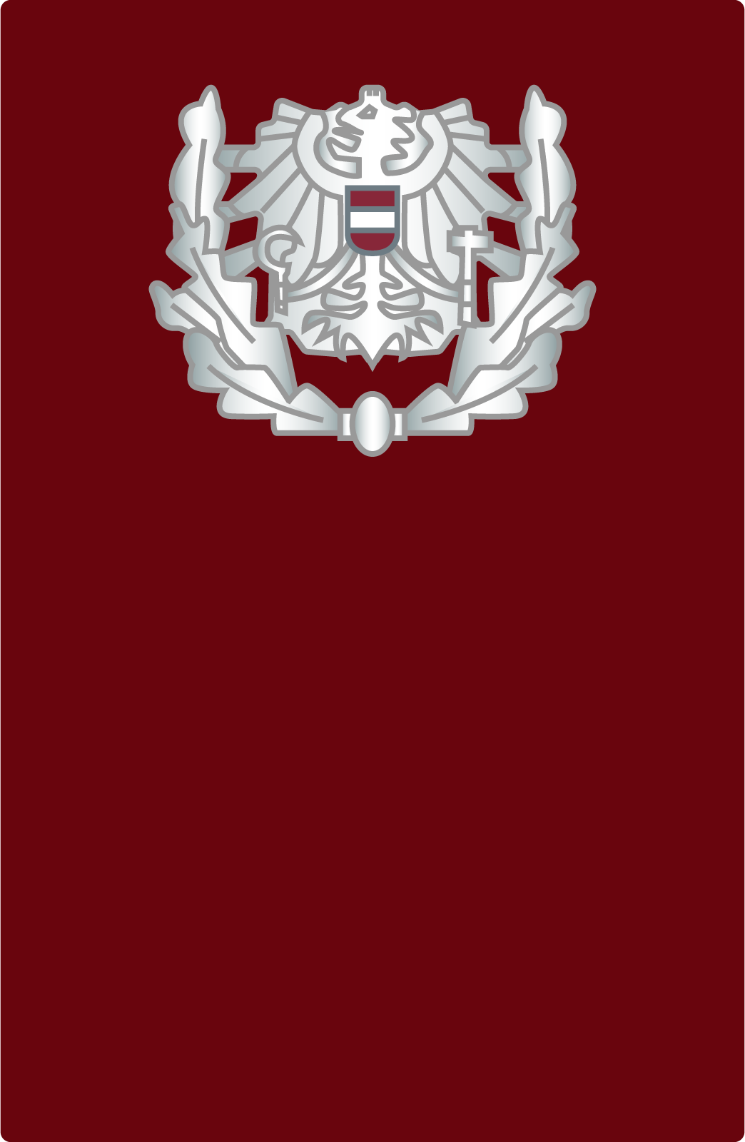 Aufschubdistinktionen eines Aspirants der österreichischen Bundespolizei